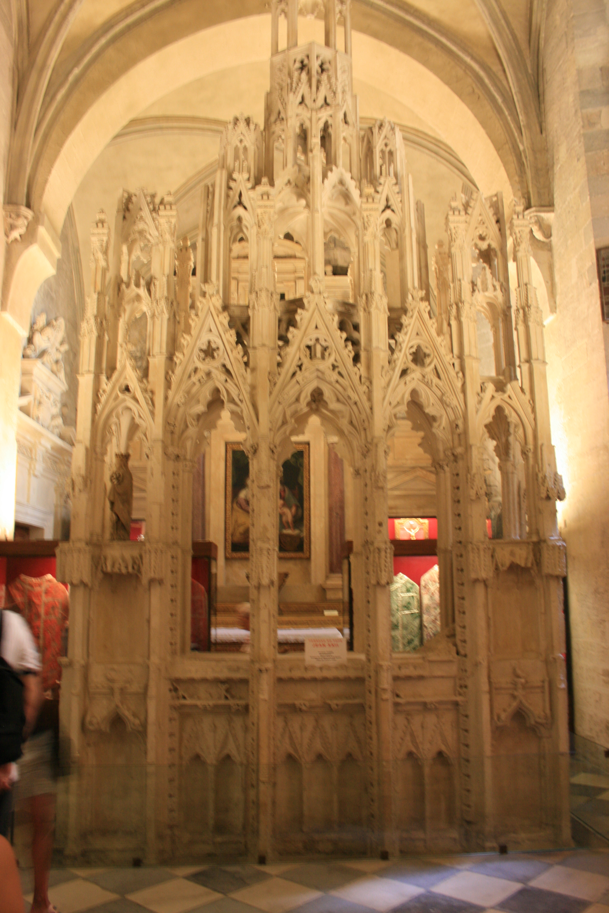 Tombeau de Jean XXII, dans la salle au trésor de la Cathédrale Notre-Dame des Doms d'Avignon